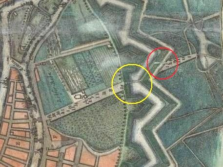 Długie Ogrody (Śródmieście) w Gdańsku. Po lewej kościół św. Barbary z niezabudowaną jeszcze okolicą. W żółtym kółku Brama Długich Ogrodów (Brama Żuławska), w czerwonym kółku Brama Żuławska (Elbląska). Mapa ustawiona zgodnie z kierunkami geograficznymi świata.